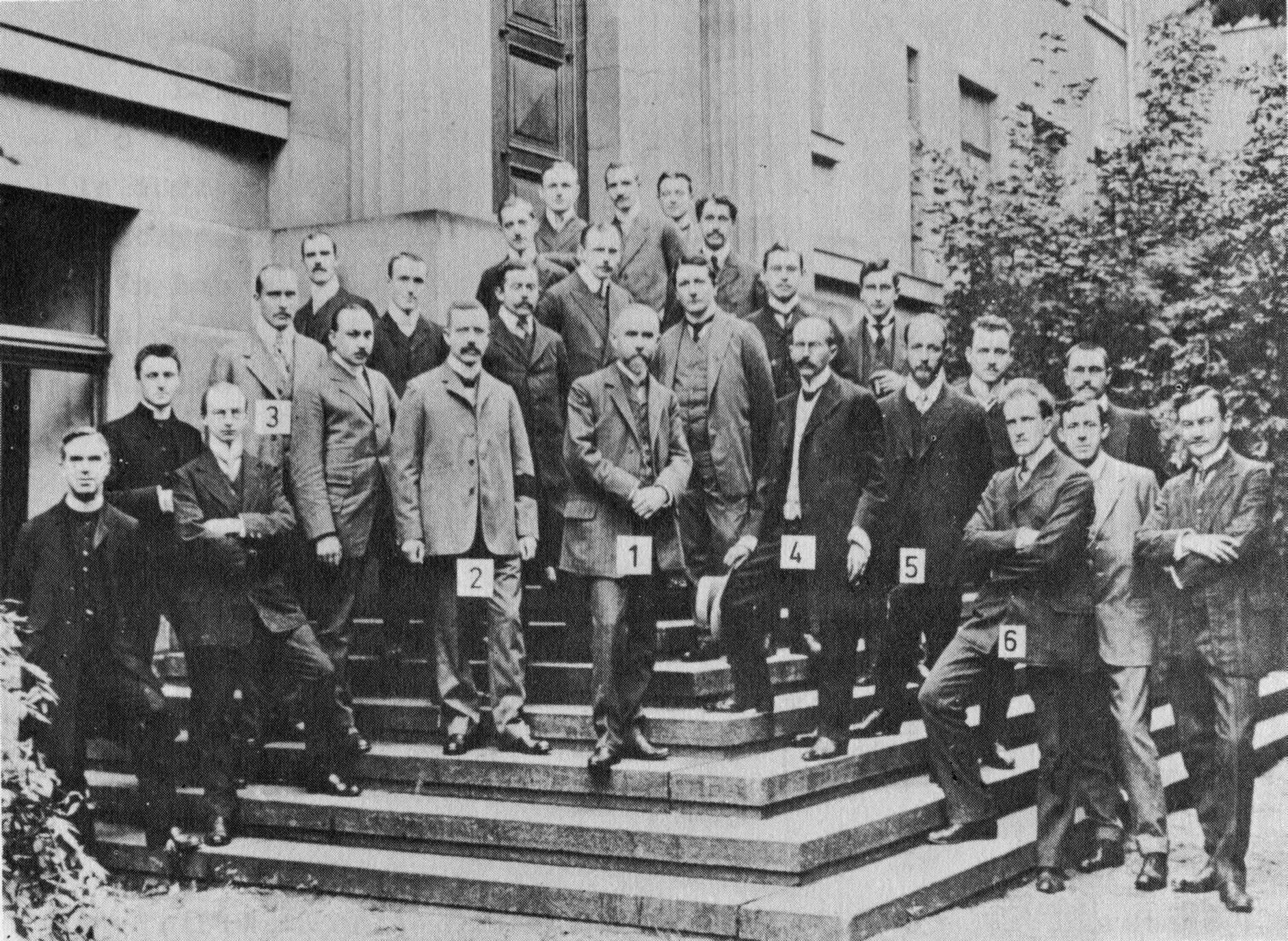 Vorstand Julius Tafel, Doktoranten und Studenten des Chem. Instituts in Würzburg, Pleicher Ring 11. 1: Prof. Julius Tafel (* 2. Juni 1862 in Choindez; † 2. September 1918 in München) 2: a.o. Prof. Wilhelm Manchot (* 5. August 1869 in Bremen; † 28. Oktober 1945 in München) 3: Bruno Emmert (* 15. Mai 1880 in Karlstadt; † 12. September 1967 in Würzburg) 4: a.pl. Prof. Fritz Reitzenstein (* 14. Januar 1868 in Mühlhausen/Obfr.; † 19. April 1940 in Behringersdorf) 5: a.pl. Prof. Hermann Pauly (* 18. Juli 1870 in Deutz/Rhein; † 31. Oktober 1950 in Würzburg) 6: Hans von Halban (* 21. Oktober 1877 in Wien; † 7. Oktober 1947 in Zürich)